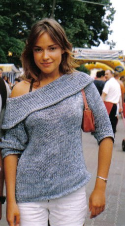 Alicja Bachleda-Curuś (ur. 12 maja 1983 w Tampico w Meksyku) – polska aktorka i piosenkarka